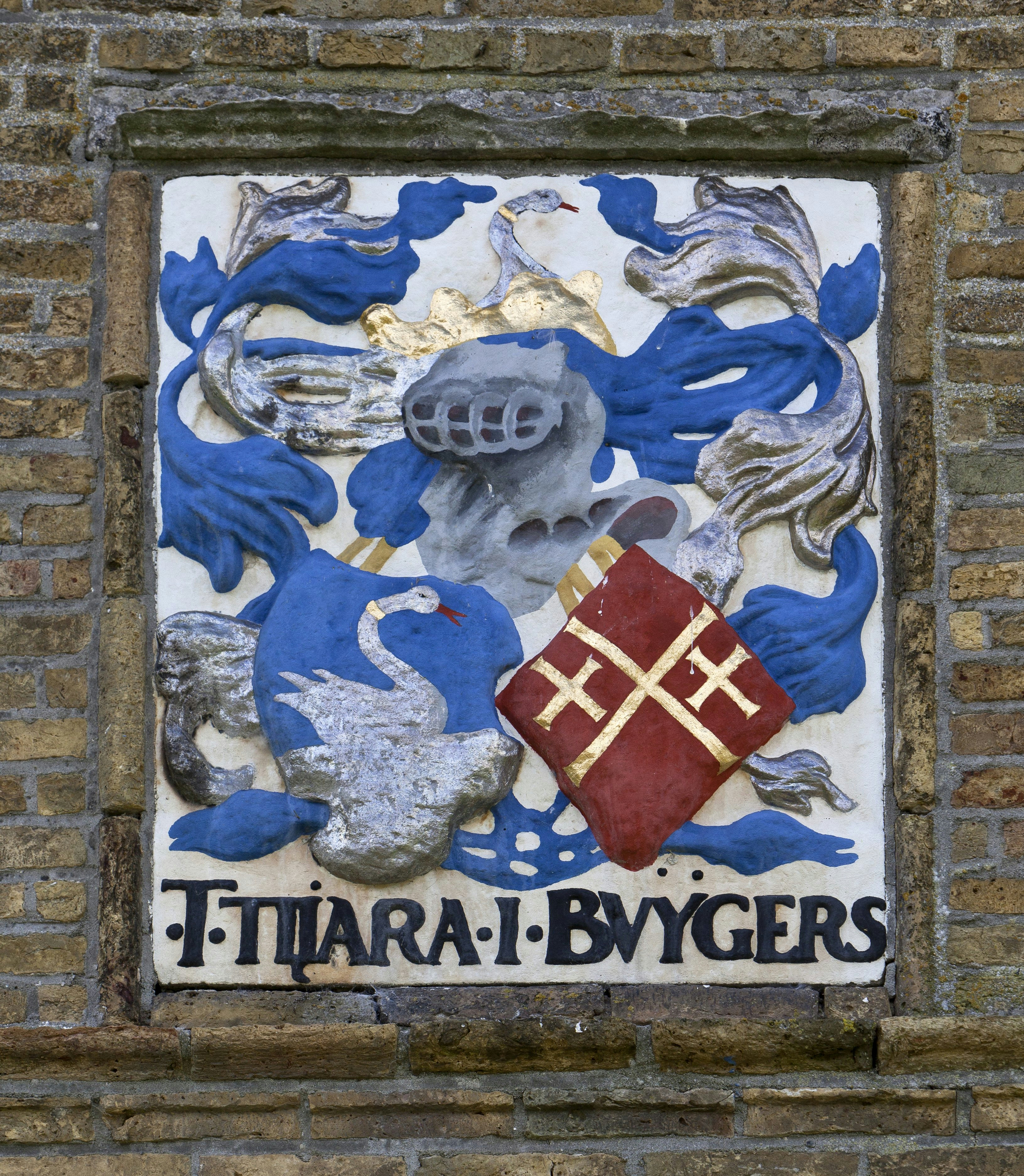 Uniastate: Gevelsteen boven de doorgang, aan de voorgevel van het poortgebouw met het alliantiewapen van Tyara en Buygers